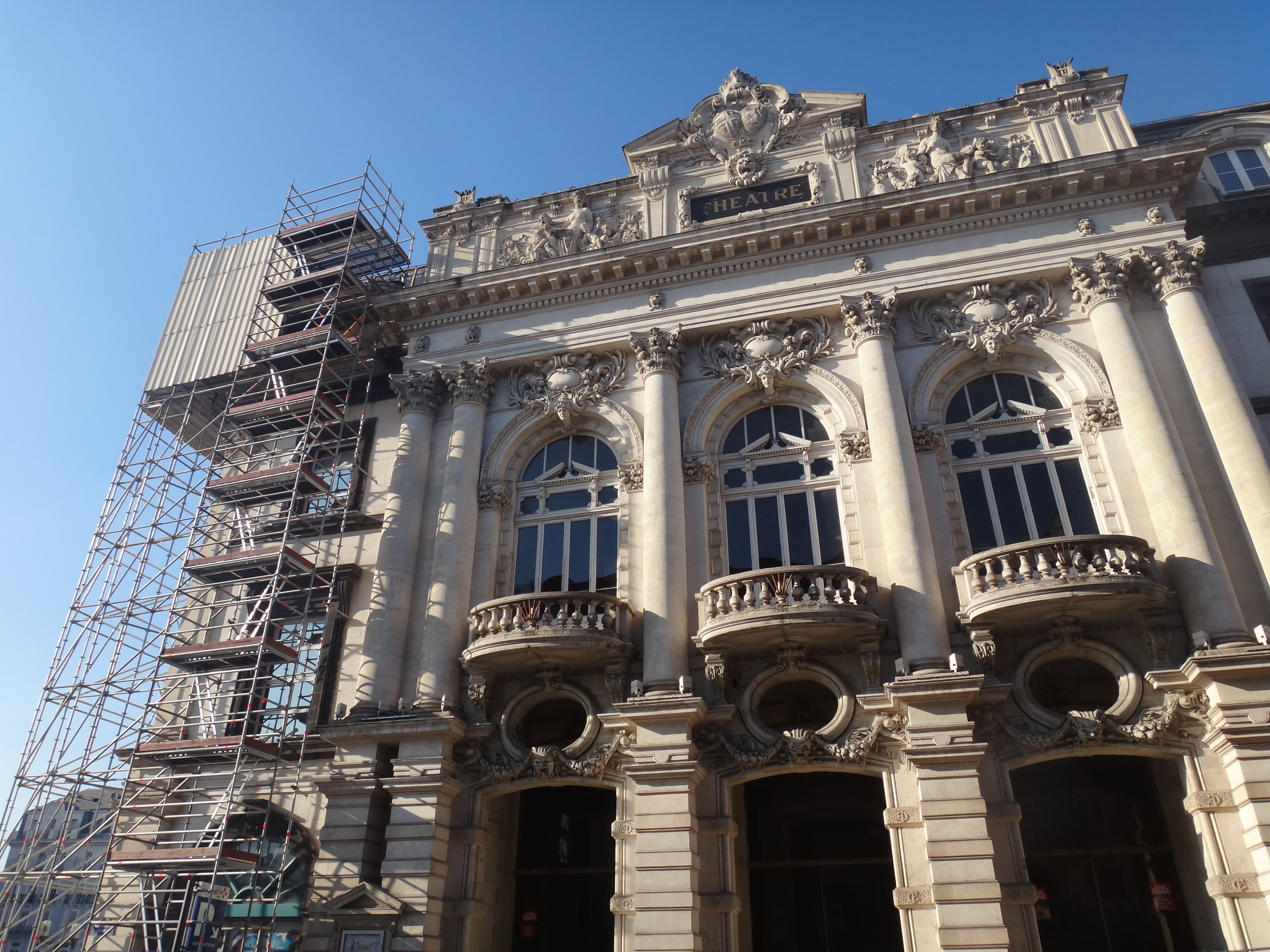 Travaux de rénovation du théâtre de Clermont-Ferrand .